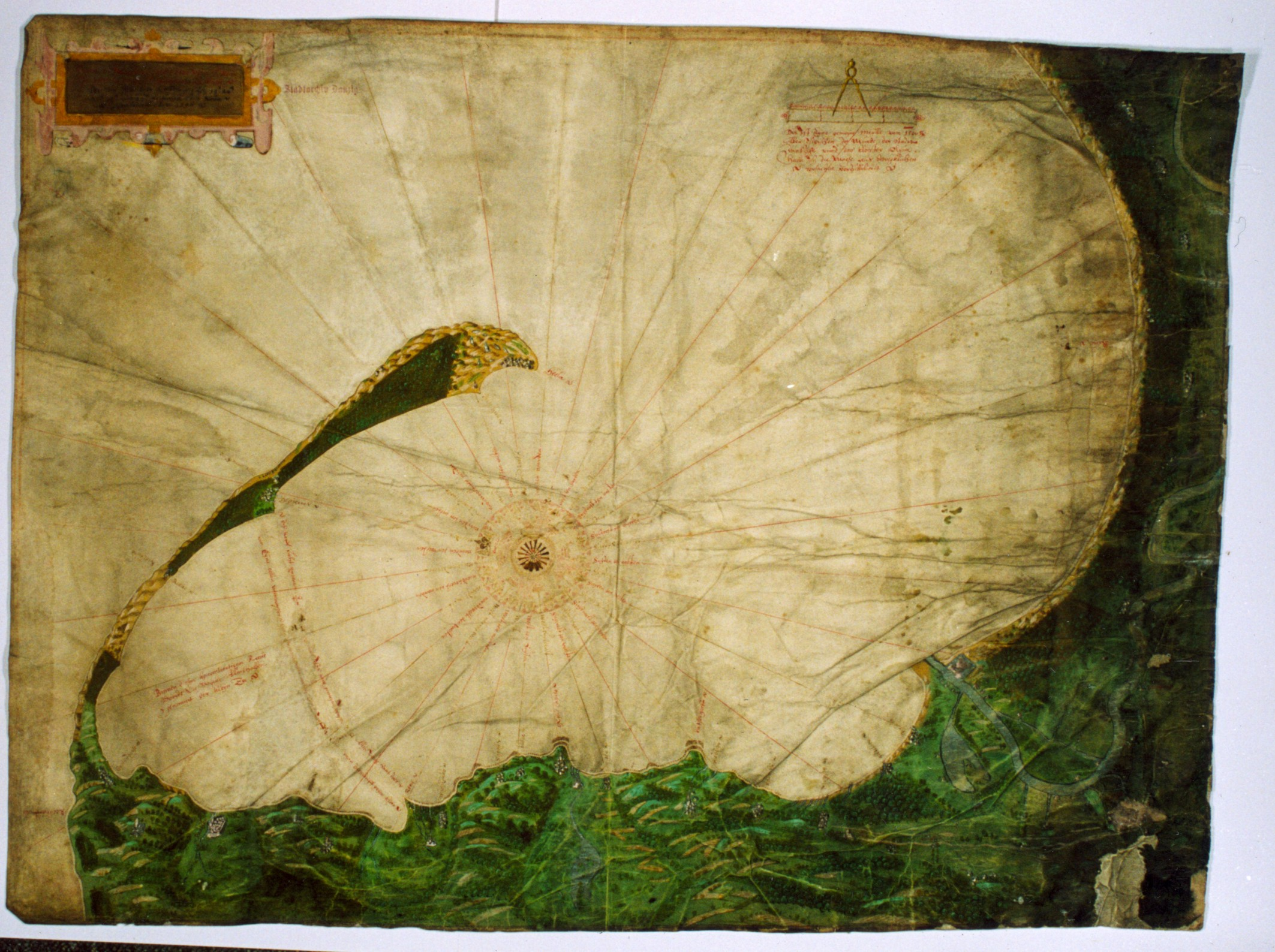 Mapa zachodniej części Zatoki Gdańskiej (portolan) – Primo et Neccesario sapere bene Usare Il Remo Chi porre la mare Il governare La Nave(..) autor: Walter Clemens, wrzesień 1596 r., skala ok. 1:107 000.. Nawigacyjna mapa morska zachodniej części Zatoki Gdańskiej z zaznaczeniem linii brzegowej od Stegny na wschodzie do Jastrzębiej Góry na zachodzie, z dokładnym odwzorowaniem przeszkód nawigacyjnych oraz charakterystycznych punktów nawigacyjnych – osiedli, ujść rzek oraz rzeźby terenu. Publikacja źródła: Groth P., Cenniejsze zabytki kartograficzne w. XVI-XVIII znajdujące się w WAP w Gdańsku, “Studia i Materiały do Dziejów Wielkopolski i Pomorza”, t. 4, 1958, s. 387., Szeliga J., Rozwój kartografii Wybrzeża Gdańskiego do 1772 roku, Wrocław 1982, s. 219. Opis zewnętrzny: Oryginał, jęz. włoski, niemiecki, holenderski, karta pergaminowa, wymiary 810 x 510 mm, wielobarwna, 1strona. Miejsce przechowywania: Archiwum Państwowe w Gdańsku, Kolekcja gdańskich planów i map, sygn. 300, MP/509. Autor komentarza: Stanisław Flis Autor fotografii: Krystyna Zalewska.